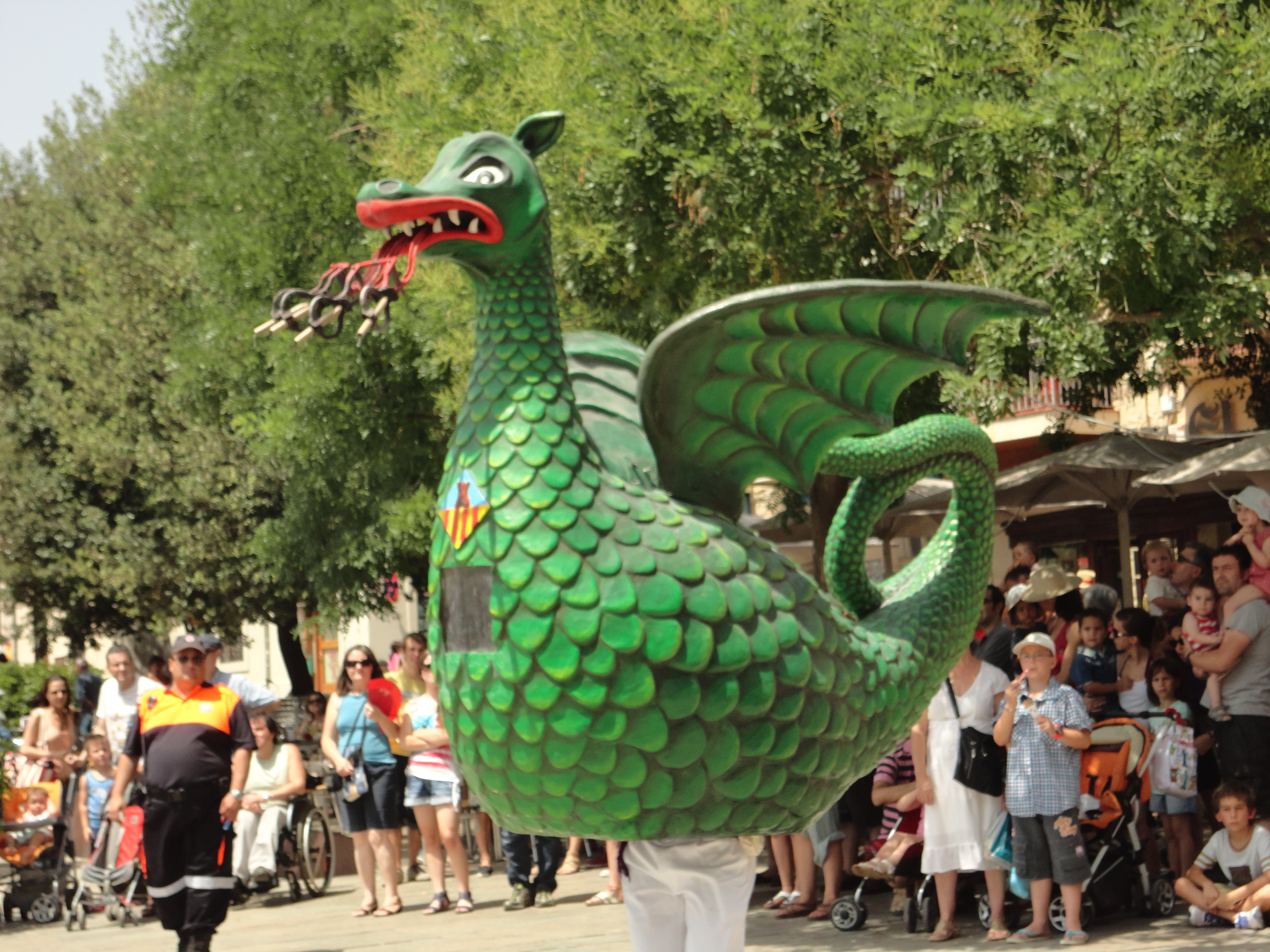 Drac de Vilanova i la Geltrú durant una actuació a Sant Cugat del Vallés.